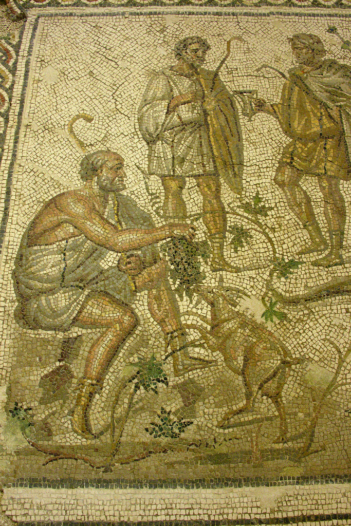 Mosaico romano en Ecija, Sevilla, Andalucía, España